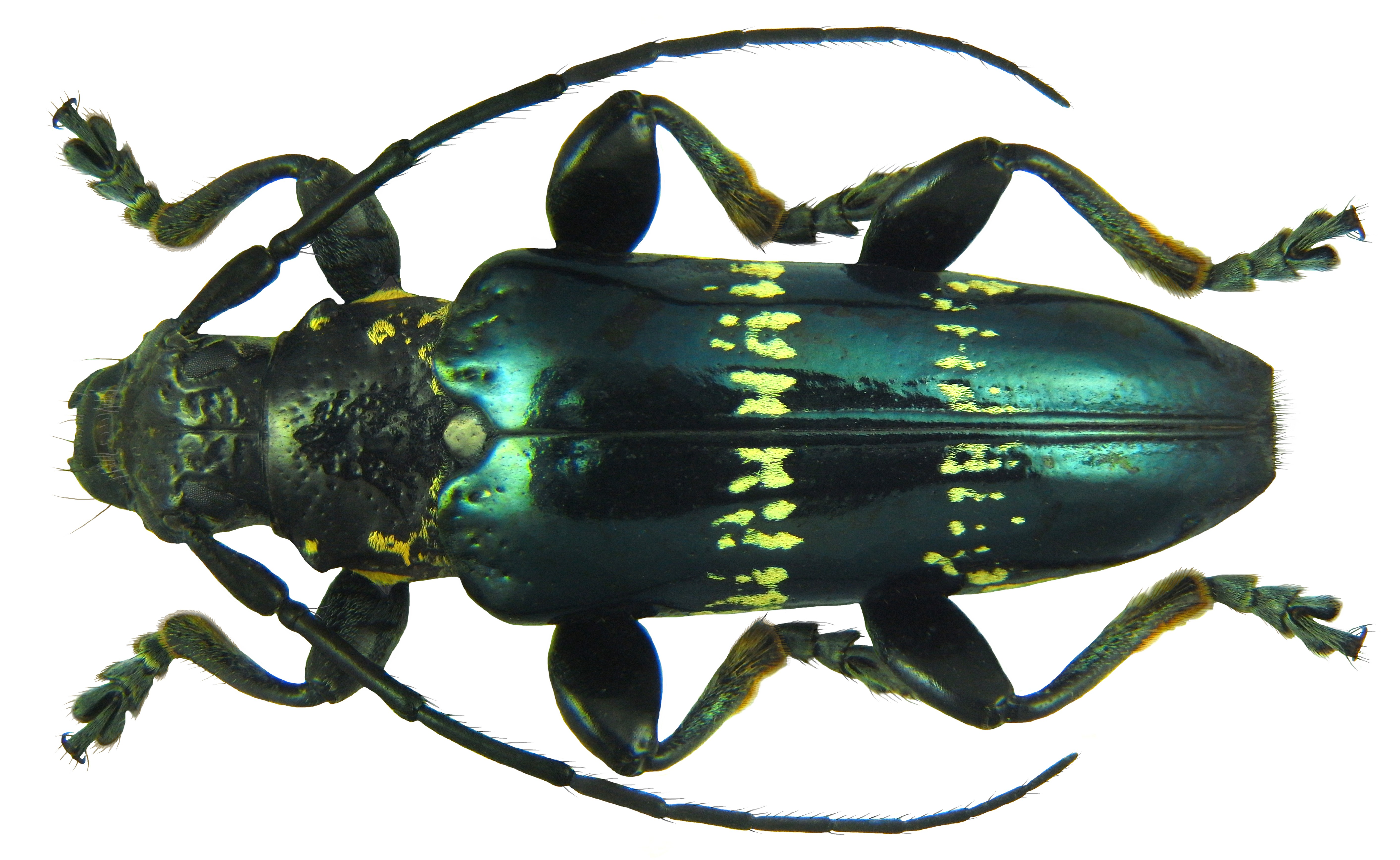 Familie: Cerambycidae Groesse: 21 mm Fundort: Indonesien, Kei-Isl. Tual-City, Choidertawun leg. A.S., 2011; det. A.Weigel, 2011 Photo: U.Schmidt, 2011